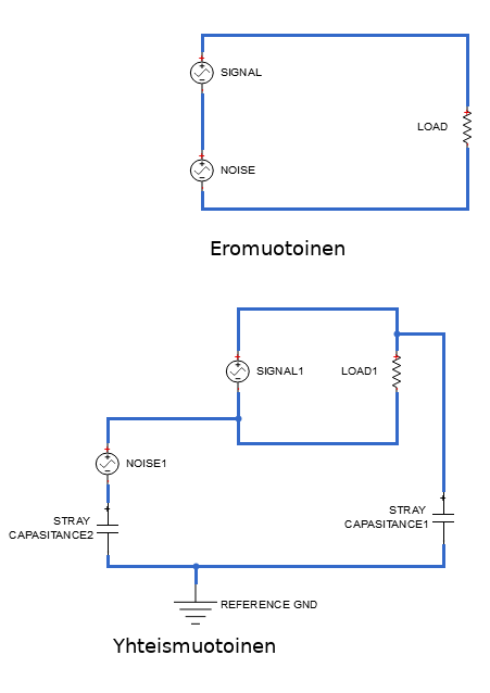 Ero- ja yhteismuotoisen häiriön kytkeytyminen (sijaiskytkentä)